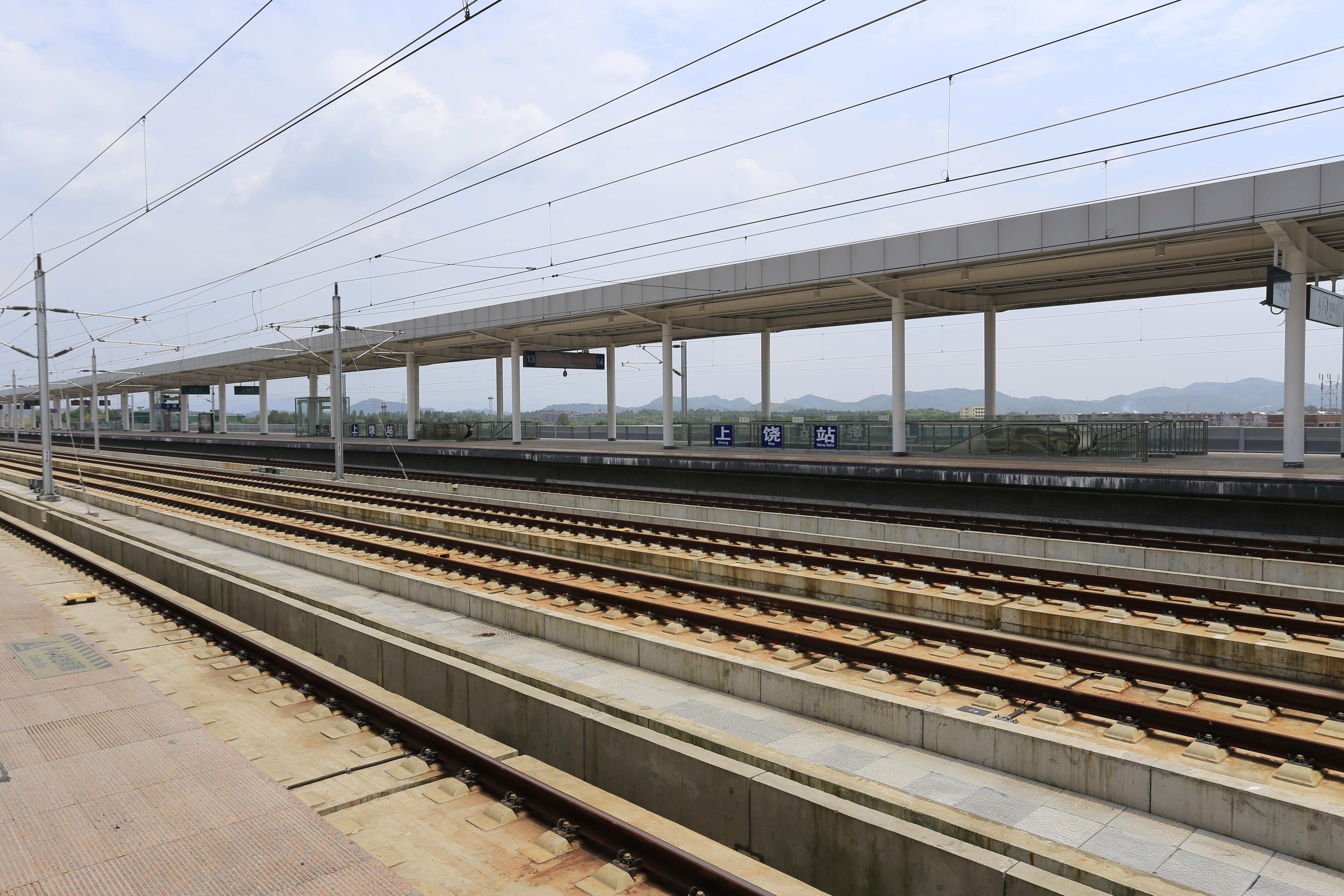 上饶站合福场